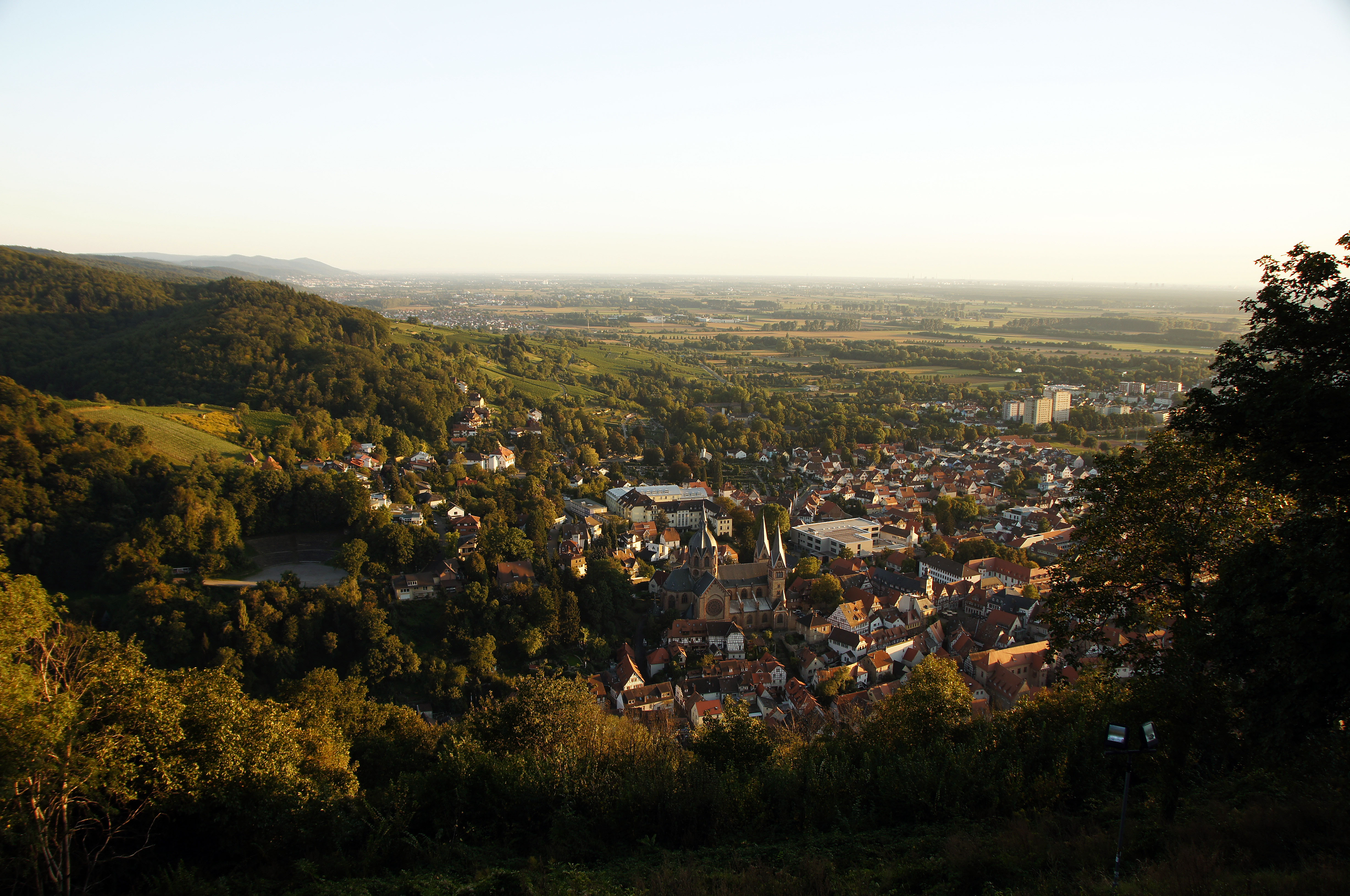 Die Rheinebene mit Heppenheim aus Sicht der Starkenburg; Kreis Bergstraße, Hessen